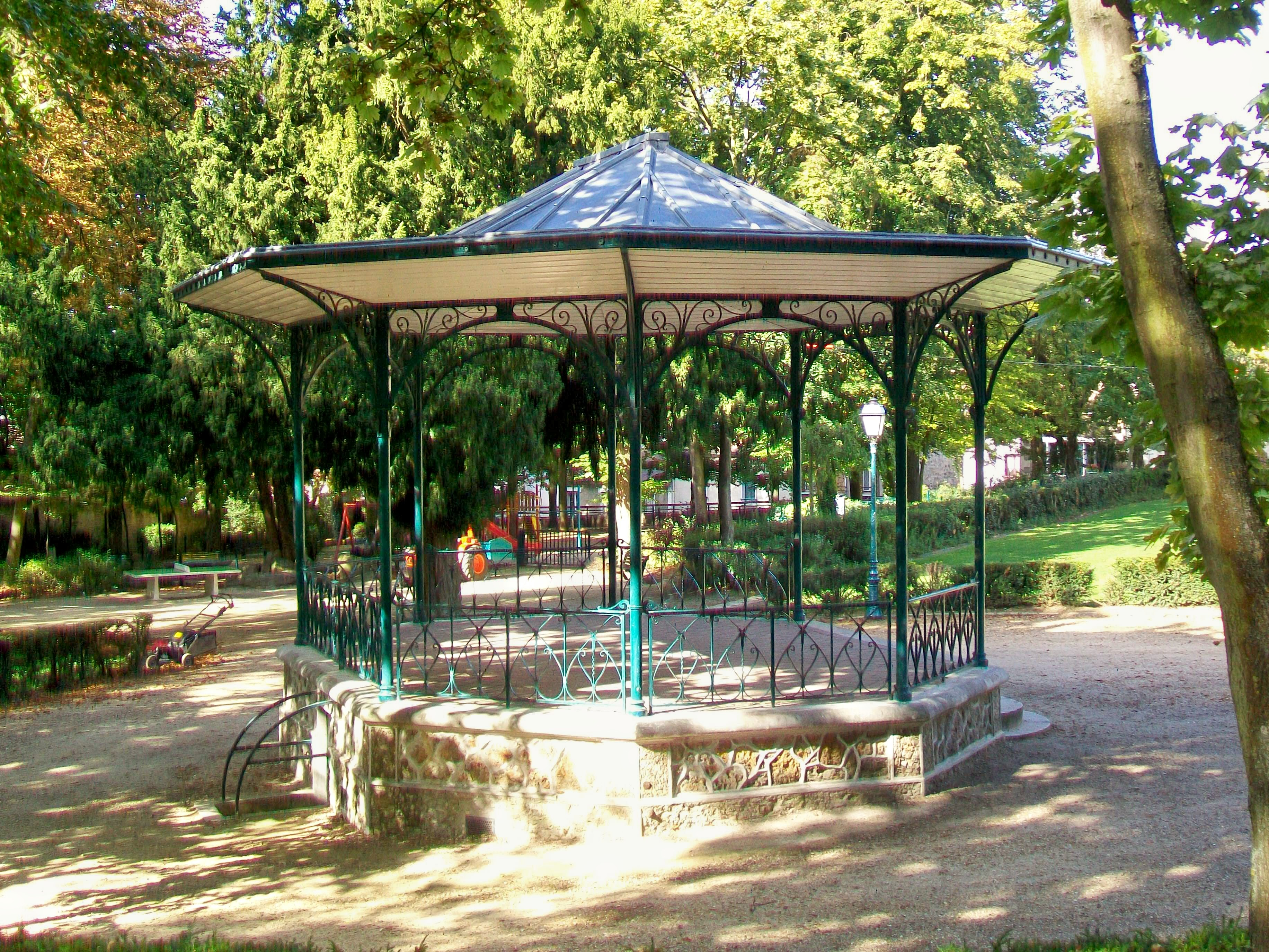 Kiosque à musique de 1887 au jardin de la ville.